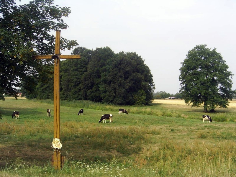 Rzeczyca/Gmina Międzyrzec Podlaski krzyż